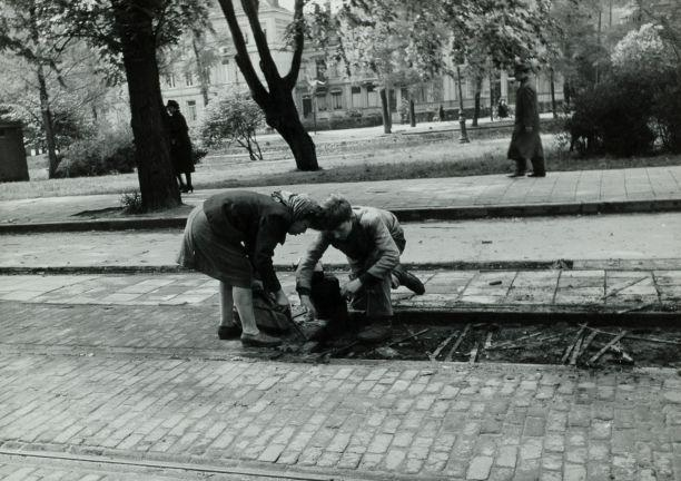 Nationaal Archief / Spaarnestad Photo, SFA006001354 Tweede Wereldoorlog. Schaarste op bevrijdingsdag: kinderen roven houtblokjes tussen de tramrails vandaan voor de houtkachel/ het fornuis. 5 mei 1945. Wold War II. Liberation of Holland. Children nicking wood from tram rails to use as fuel in the stove. The Netherlands, location unknown. May 5, 1945. Collectie Spaarnestad Voor meer informatie en voor meer foto’s uit de collectie van Spaarnestad Photo, bezoek onze Beeldbank: U kunt ons helpen onze kennis van de fotocollecties te verrijken door tags en commentaren toe te voegen. Herkent u mensen of locaties of heeft u een bijzonder verhaal te vertellen bij één van de foto’s, laat dan een reactie achter (als u ingelogd bent bij Flickr) of stuur een mailtje naar: You can help us gain more knowledge on the content of our collection by simply adding a comment with information. If you do not wish to log in, you can write an e-mail to